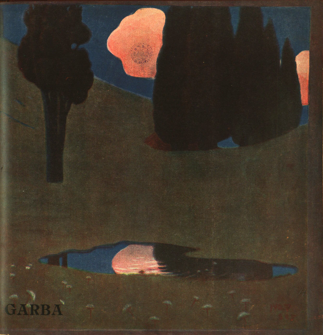 Garba (revista)